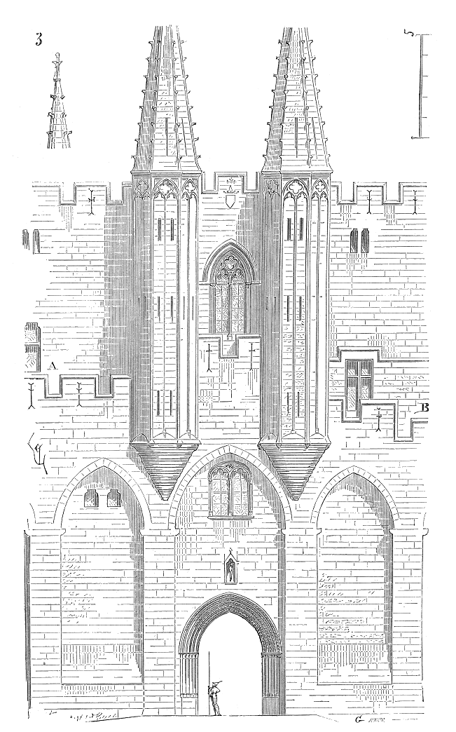 ... La porte principale du palais des papes, à Avignon, est également flanquée de deux véritables tourelles, dont la disposition mérite l'attention. Cette façade se compose d'une suite d'arcs percés de mâchicoulis à la hauteur de 15 mètres au-dessus du sol, et portant un chemin de ronde crénelé, en arrière duquel le mur de face s'élève jusqu'aux combles et porte un second crénelage. Les deux tourelles de la porte reposent, en tas de charge, sur deux piles des arcs formant mâchicoulis, et profitent de la saillie du chemin de ronde pour s'élever jusqu'au crénelage supérieur (fig. 3); elles flanquent ainsi les deux chemins de ronde inférieurs A et B, et ajoutent aux défenses de la porte ...